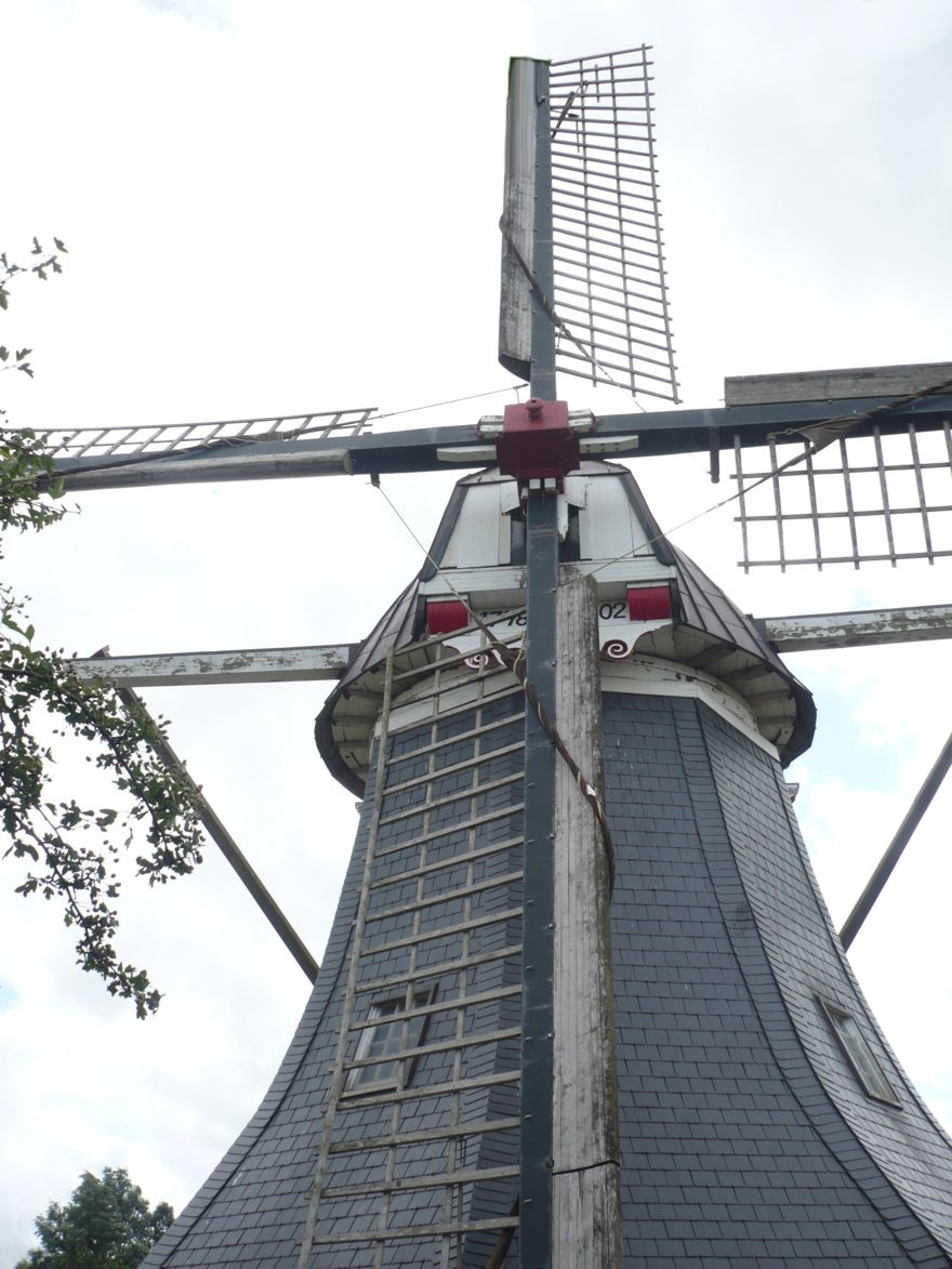 Windmühle im Werdum/Ostfriesland